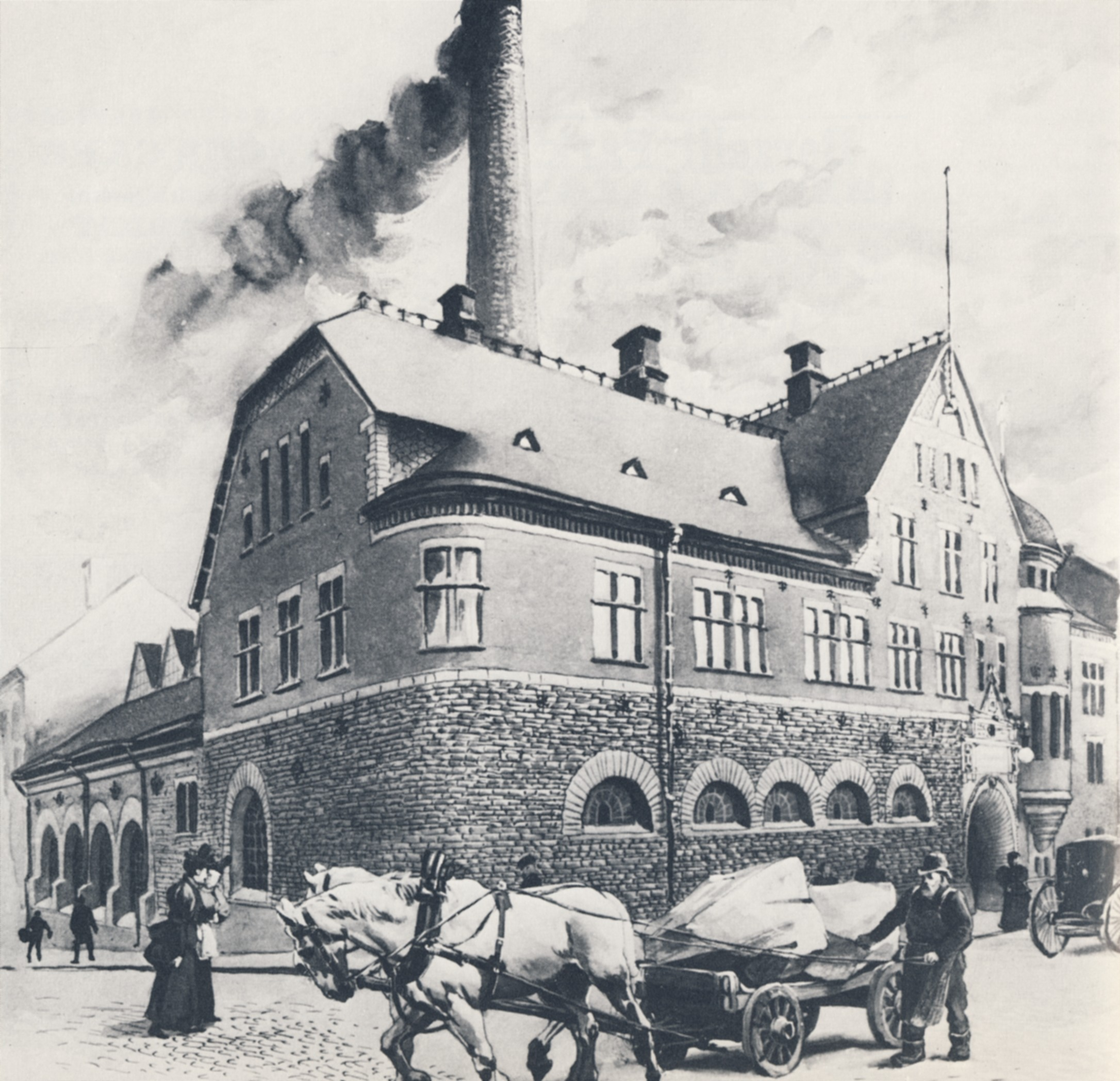 Brunkebergs elekticitetsverk i Stockholm